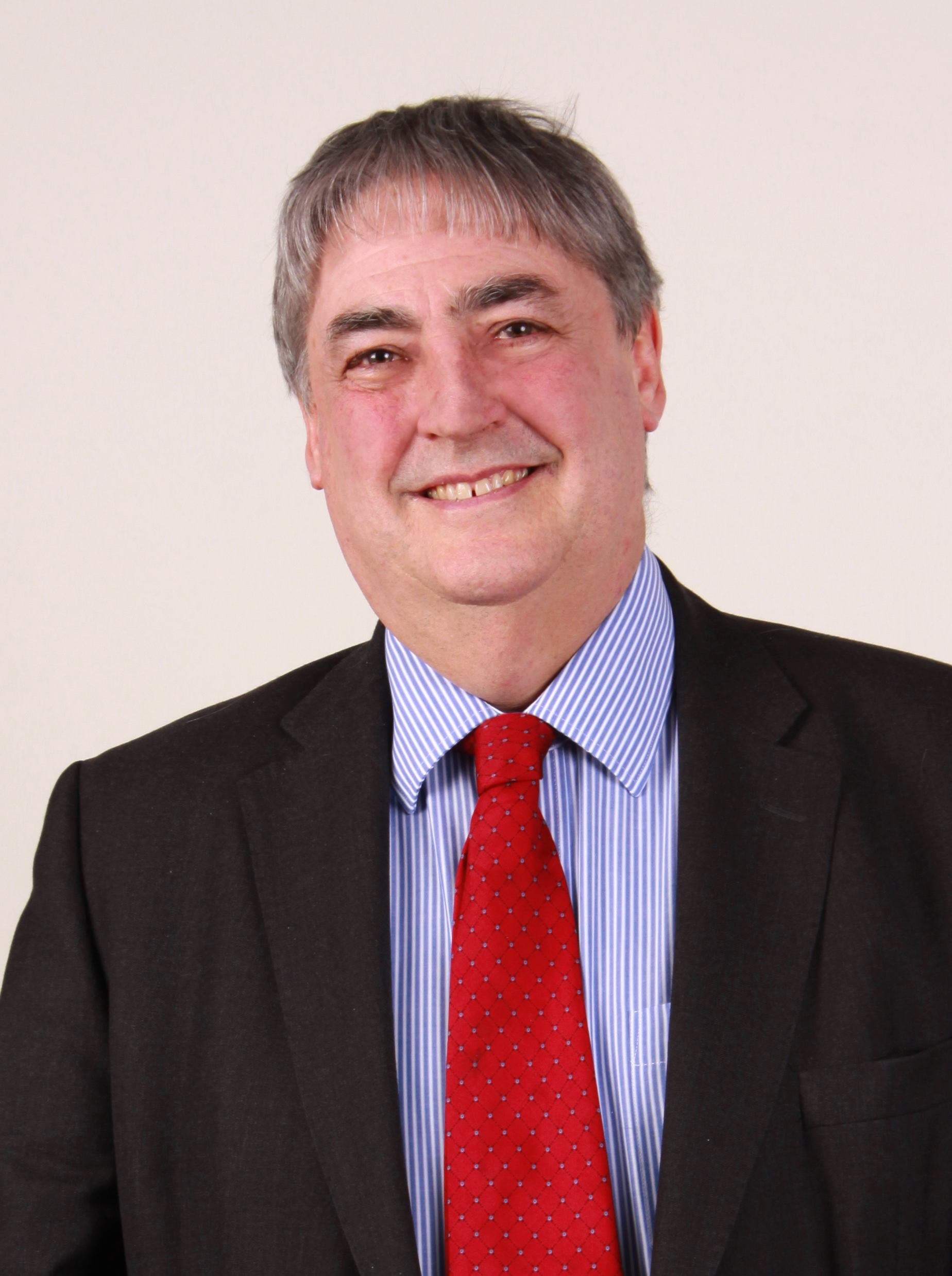 Abgeordnete/r Europaparlament